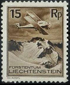 Первая авиапочтовая марка Лихтенштейна